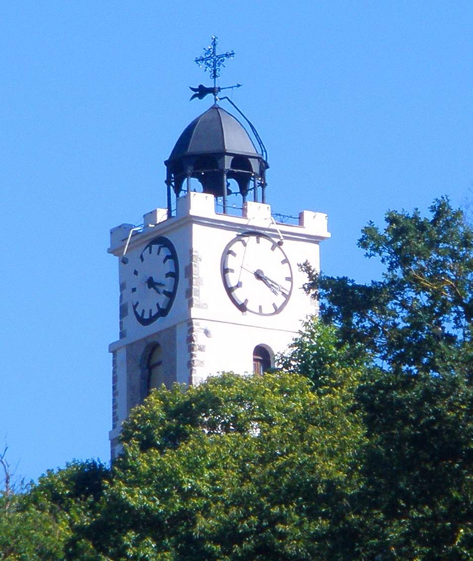 Azkoitia - Ermita de San Martín de Iraurgi (Torre del Reloj)